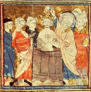 Baptism of Clovis. Grandes Chroniques de France. Castres, Bibliothèque Municipale, fol. 11.